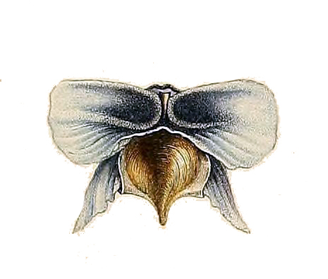 Cavolinia tridentata australis